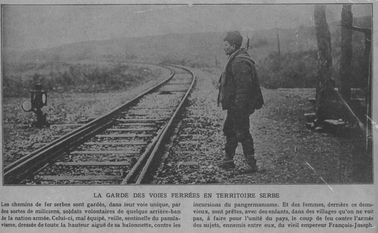 Un garde-voie, Serbe, paru dans le Miroir d'août 1914.